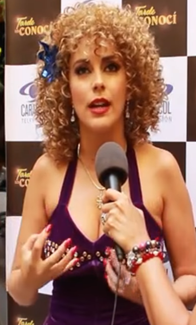 María Elisa Camargo, protagonista de El Barón, Tarde Lo Conocí, Bajo el Mismo Cielo